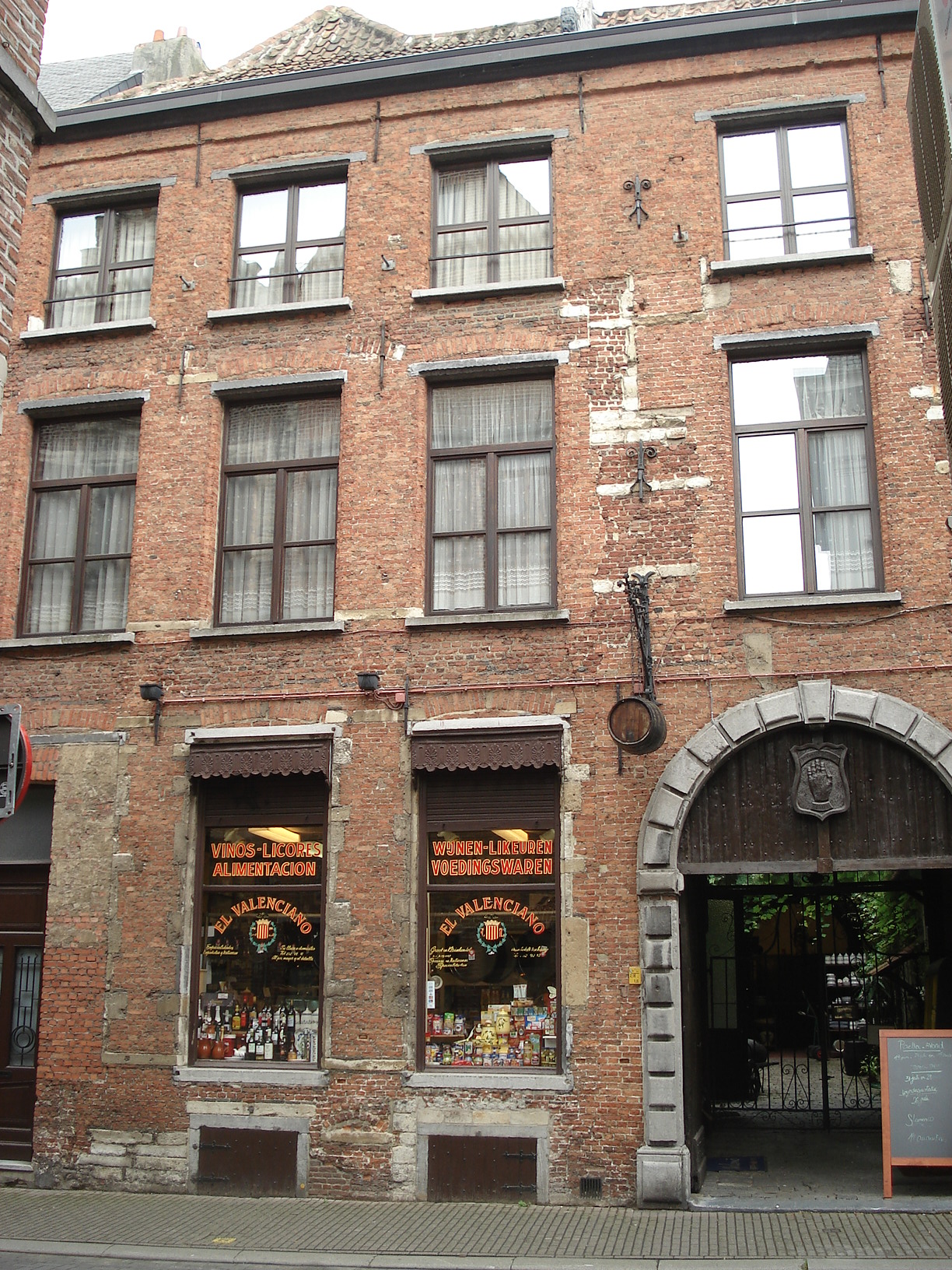 Antwerpen, België. Ouderlijk huis van Wannes Van de Velde aan de Zirkstraat.